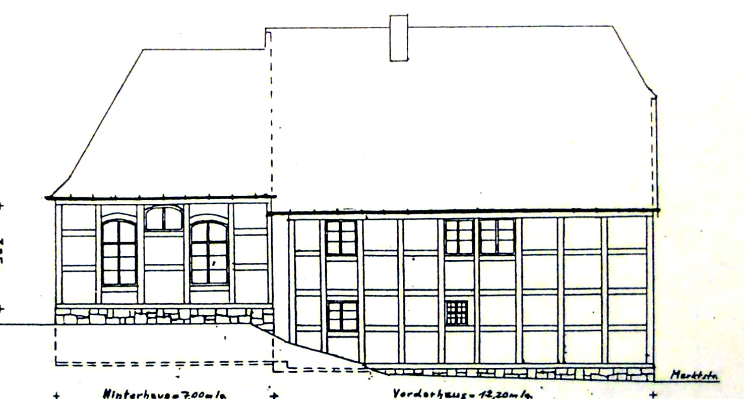 Brilon, die Synagoge von 1910 bis 1929, heute Marktstraße 16. Die Synagoge befand sich im Anbau